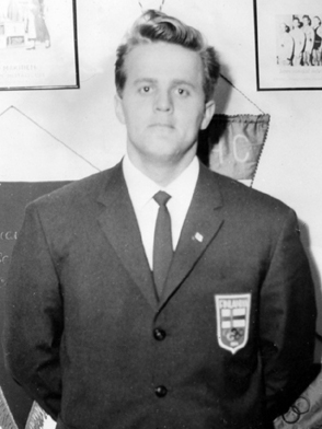 Jaakko Kailajärvi